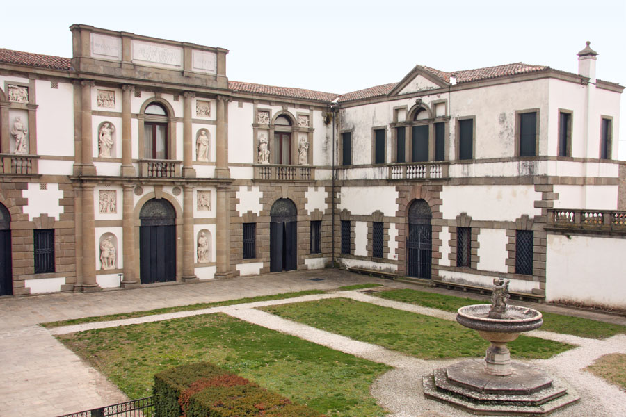 Villa Duodo a Monselice